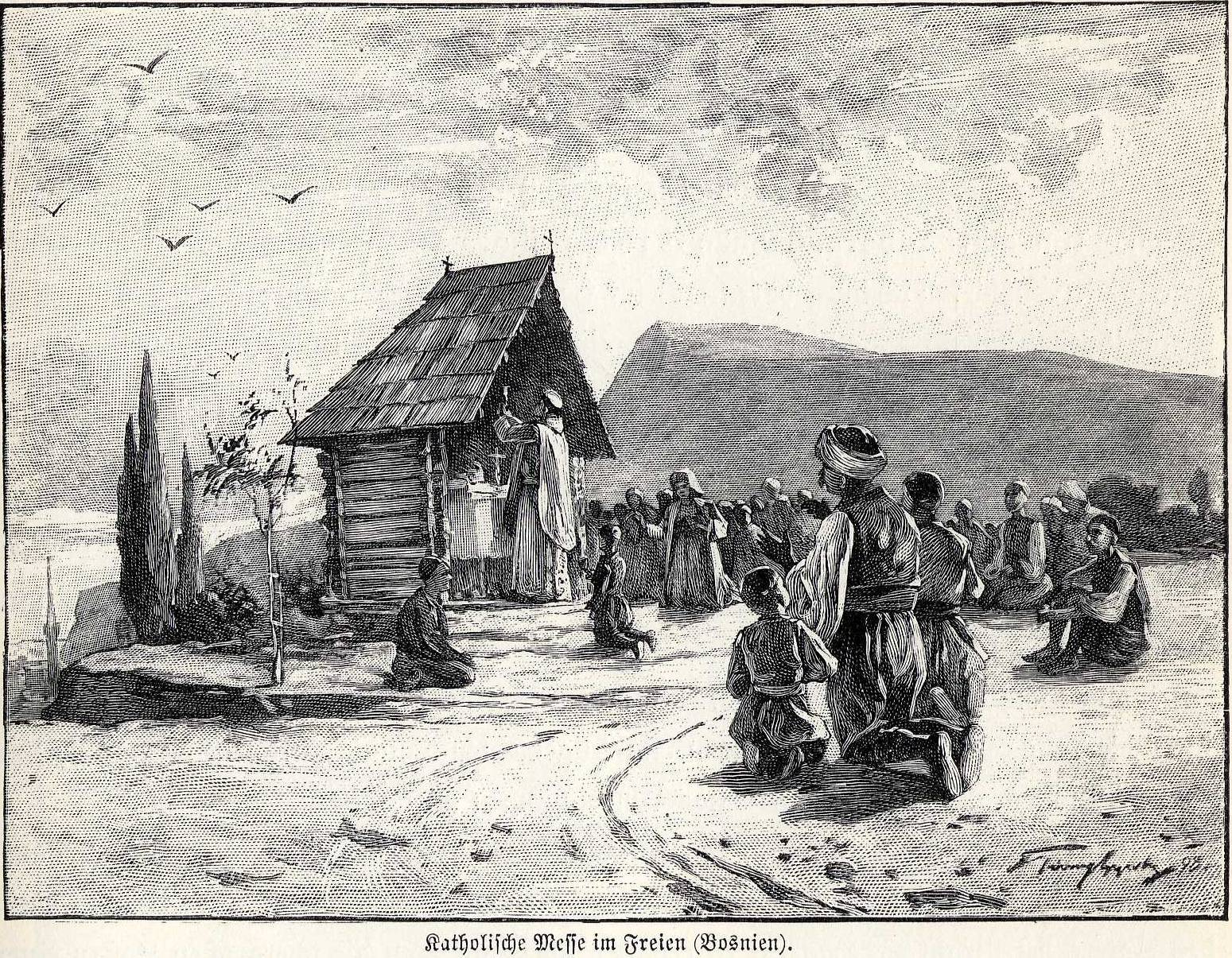 Katholische Messe im Freien (Bosnien)